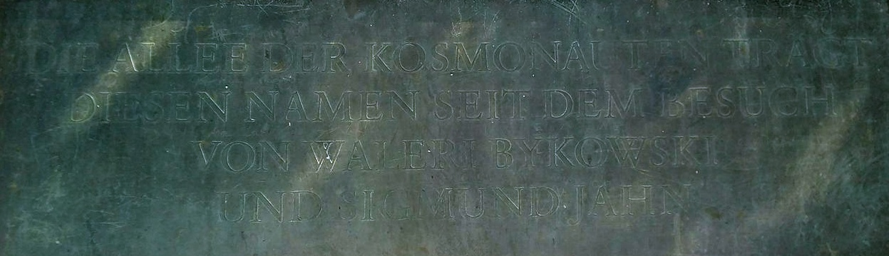 Aufgestellt an der Ecke Marchwitzastraße